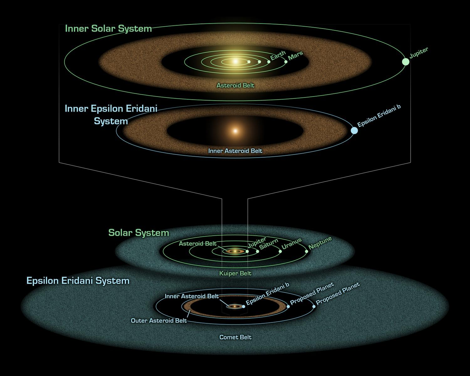 System Epsilon Eridani